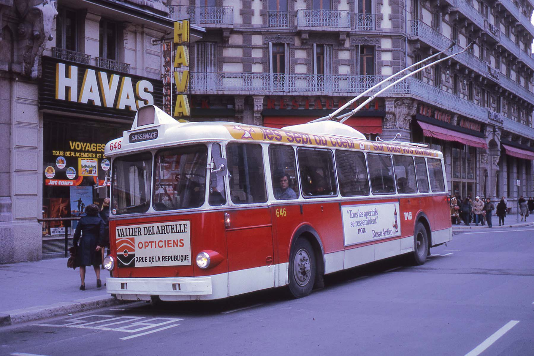 Vetra VBF de la TAG (Grenoble), ex-RATP 8120. Rue Felix Poulat en 1975.